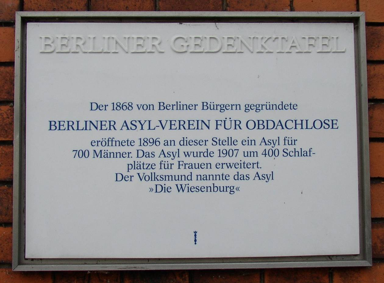 Berliner Gedenktafel für den Berliner Asyl-Verein für Obdachlose (Wiesenstraße 55) in Berlin-Gesundbrunnen, Deutschland